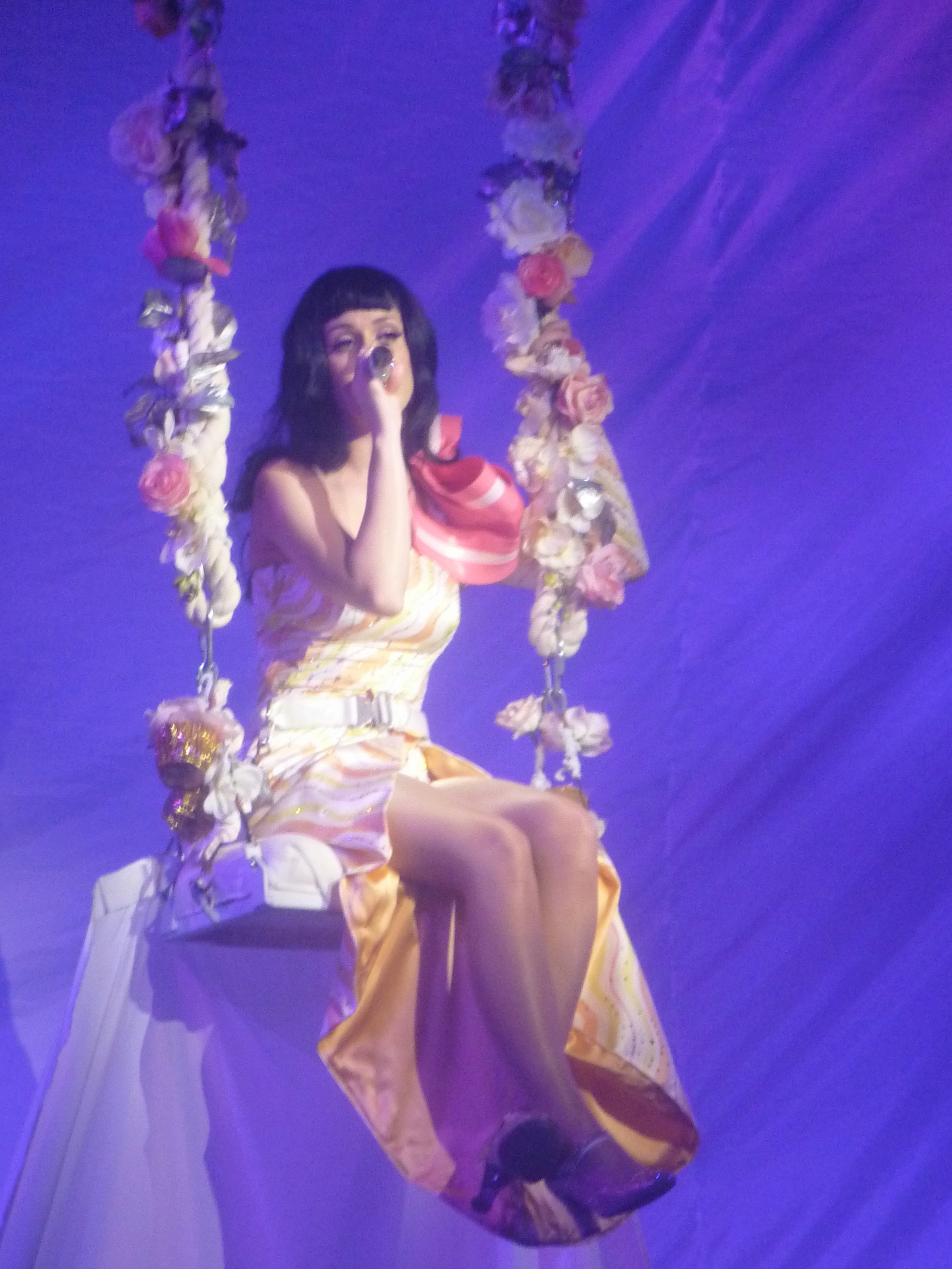 Photos de Katy Perry en concert au Zenith de Paris en mars 2011 dans le cadre de sa tournée " California Dreams Tour "